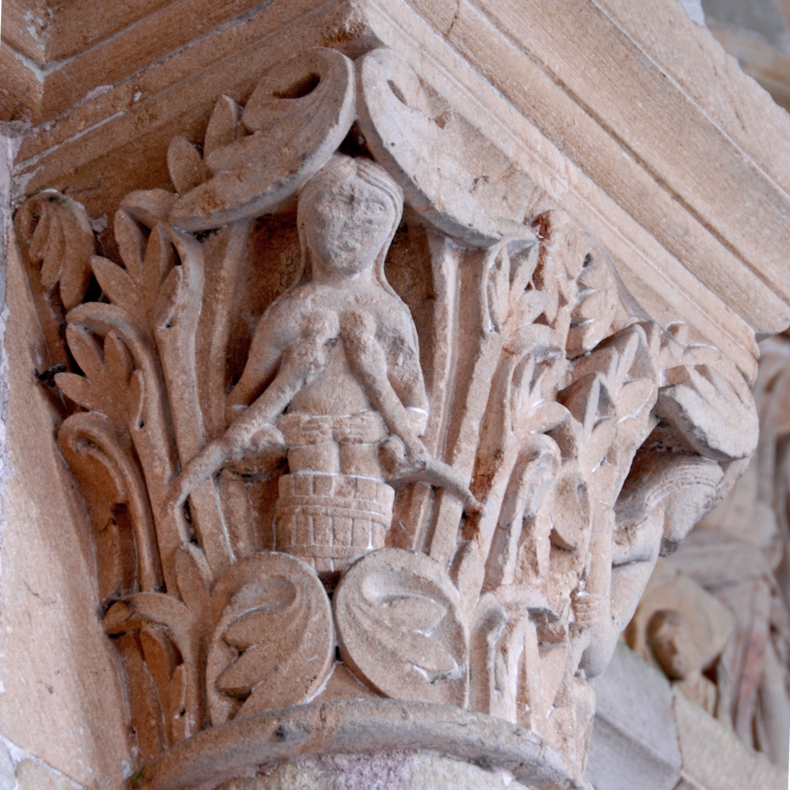 Portalvorbau, Kapitell, Frau säugt Schlangen